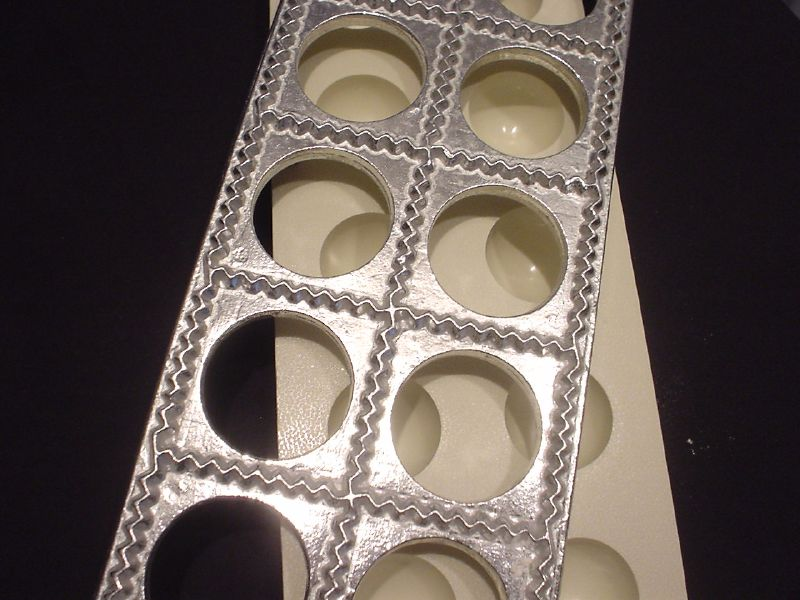 Ravioli maker